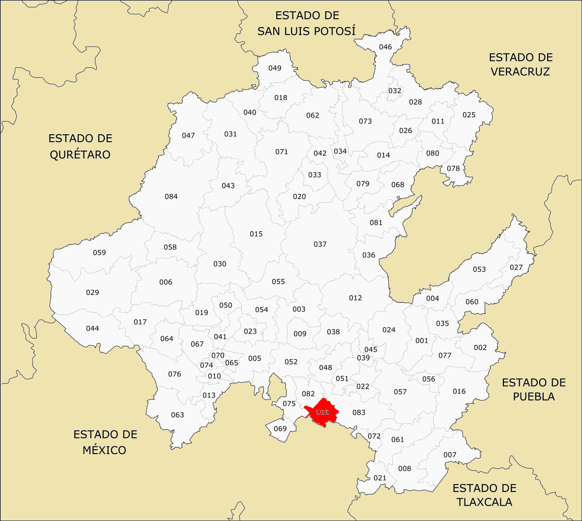 Municipios de Hidalgo